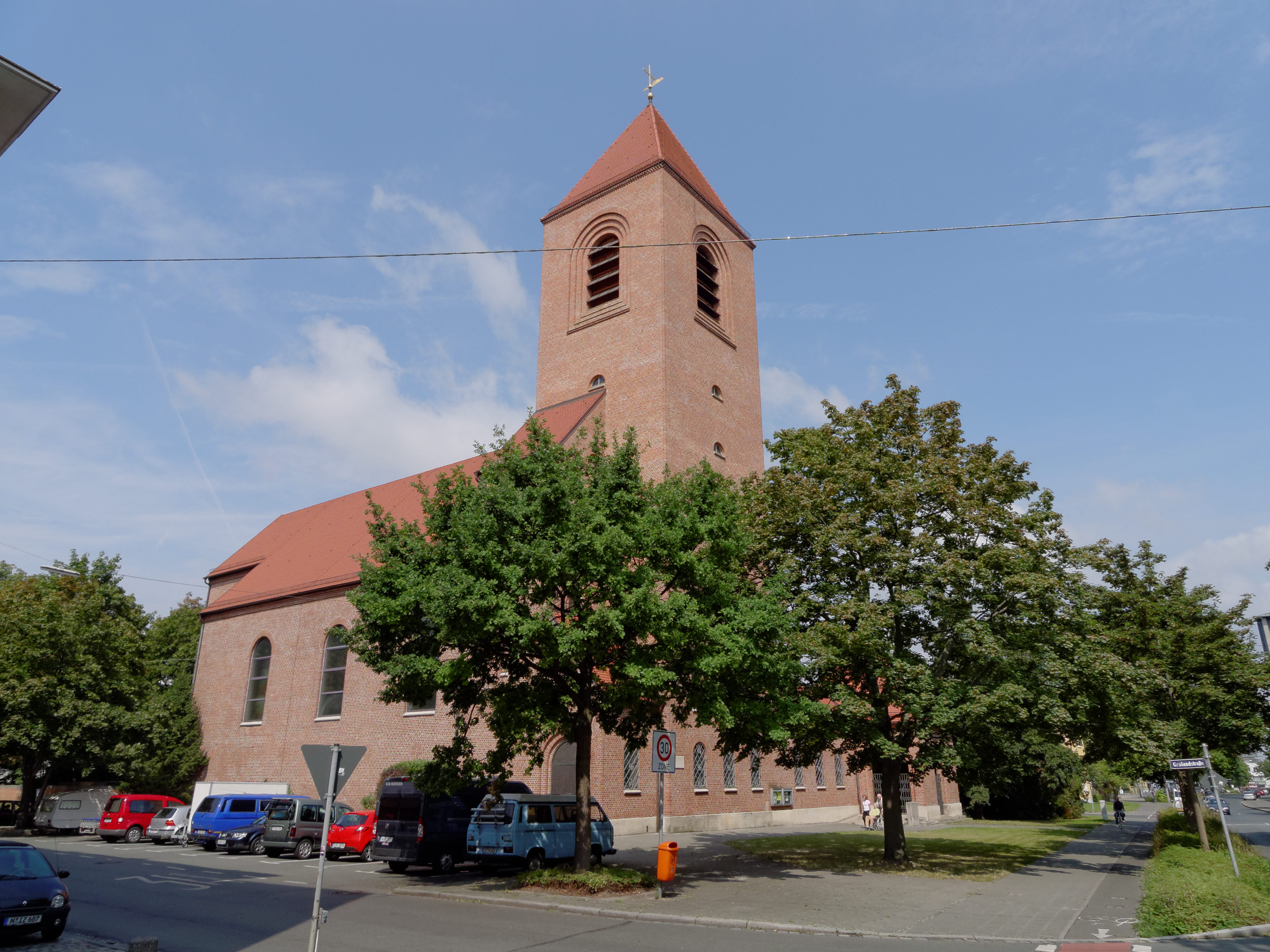 Blick von Südosten auf die kath. St. Martin Kirche in Nürnberg